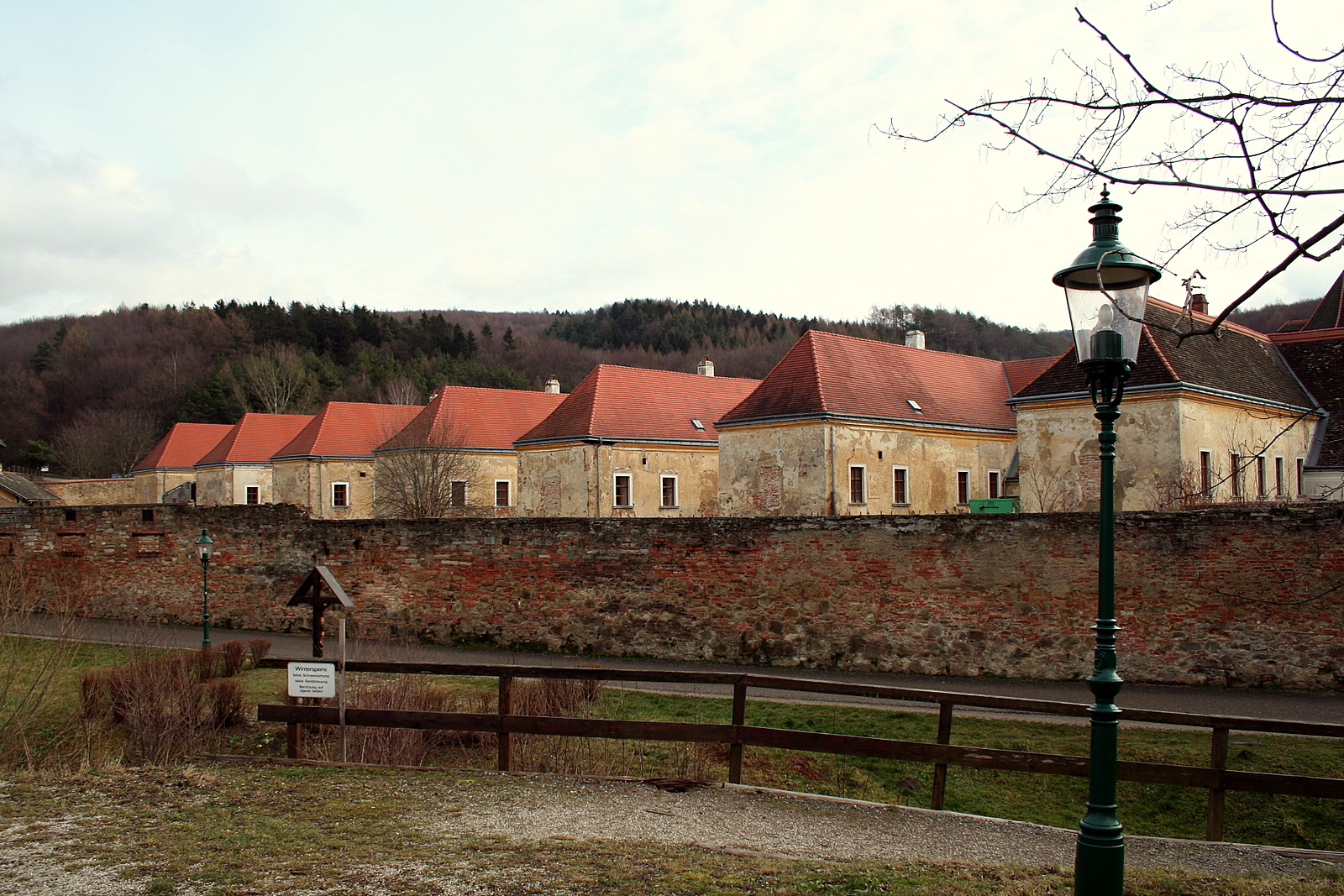 ehemalige Mönchszellen an der Außenseite des Kreuzganges in der Kartause Mauerbach